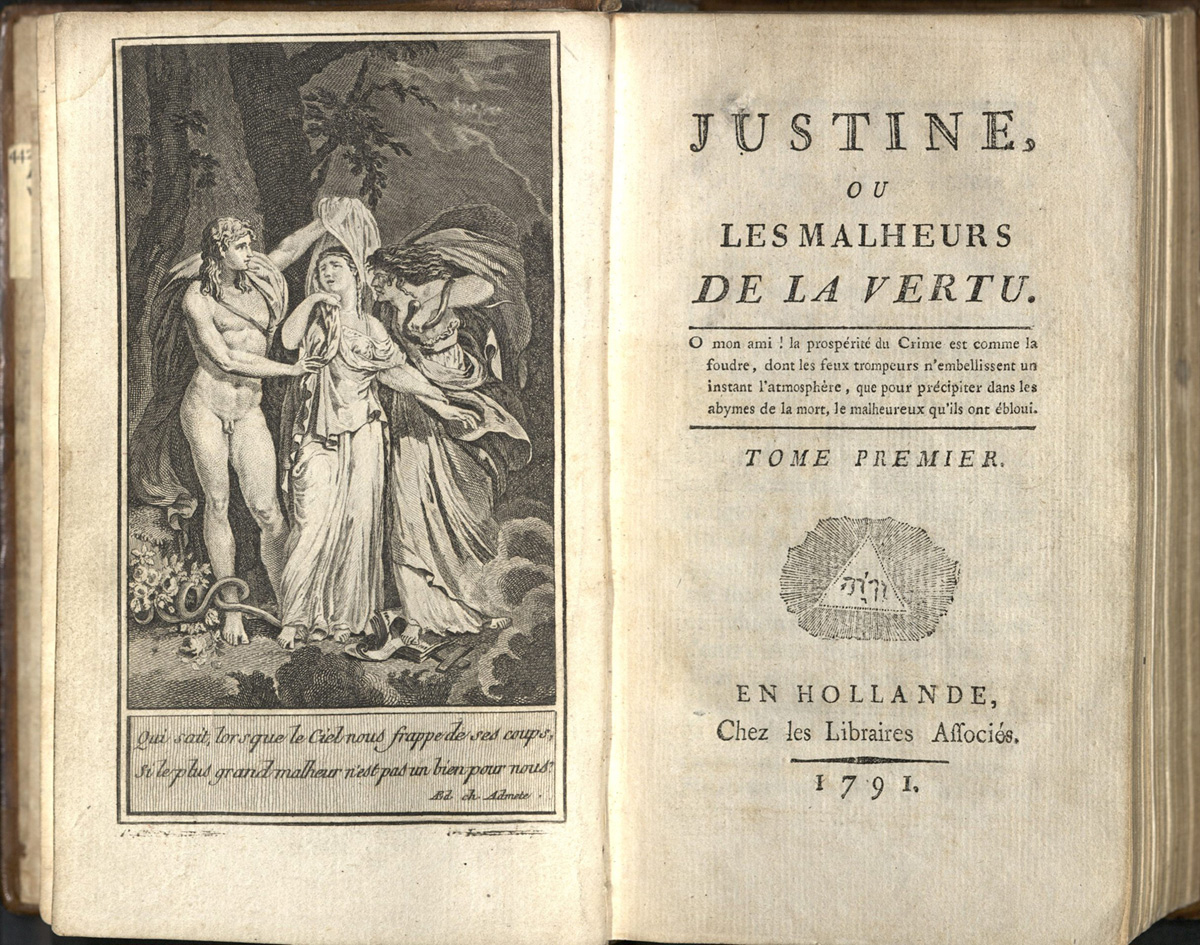 First page from Justine (Justine ou les malheurs de la vertu, Paris)